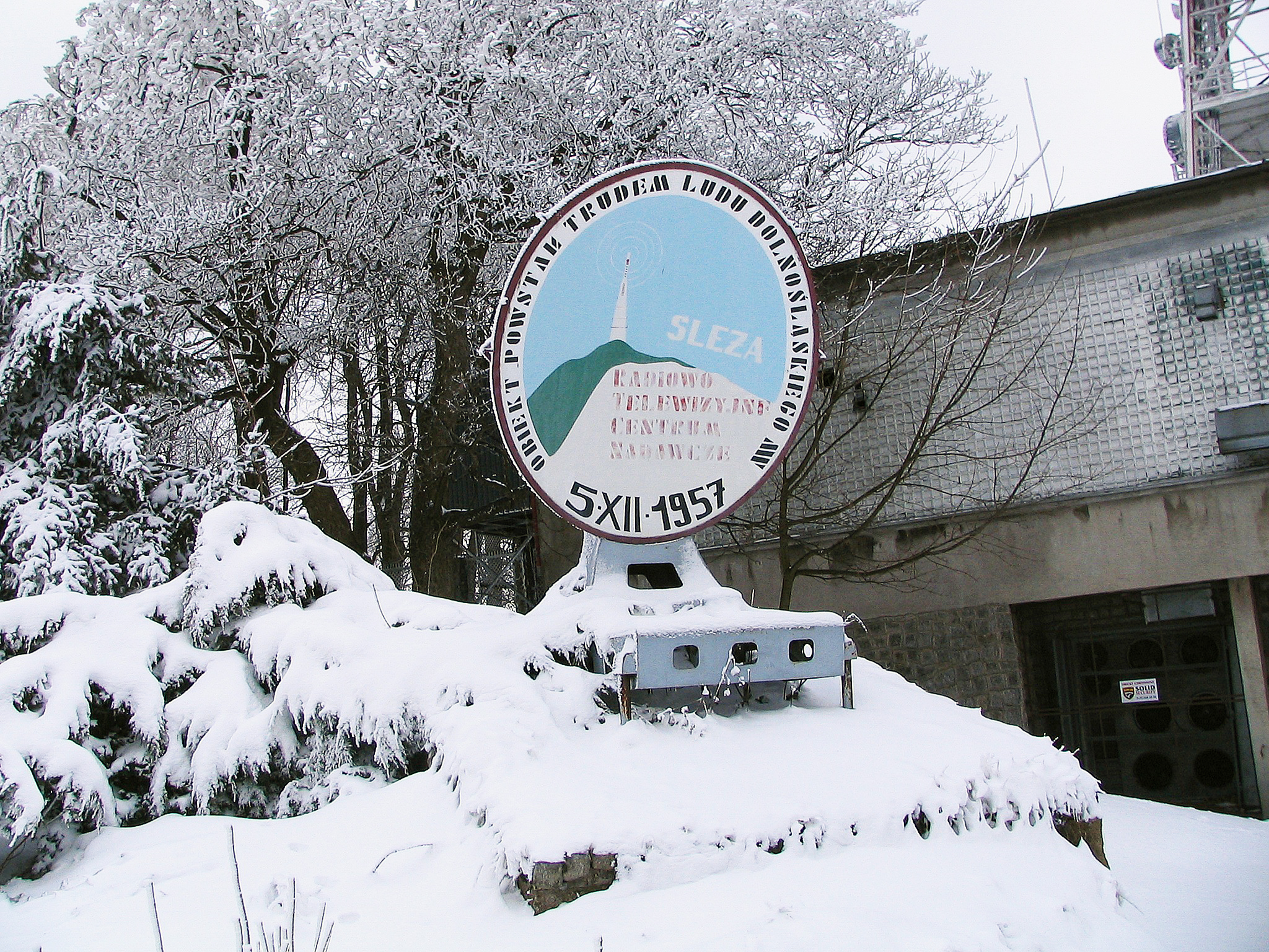 Przed wejściem do budynku RTCN Ślęża.